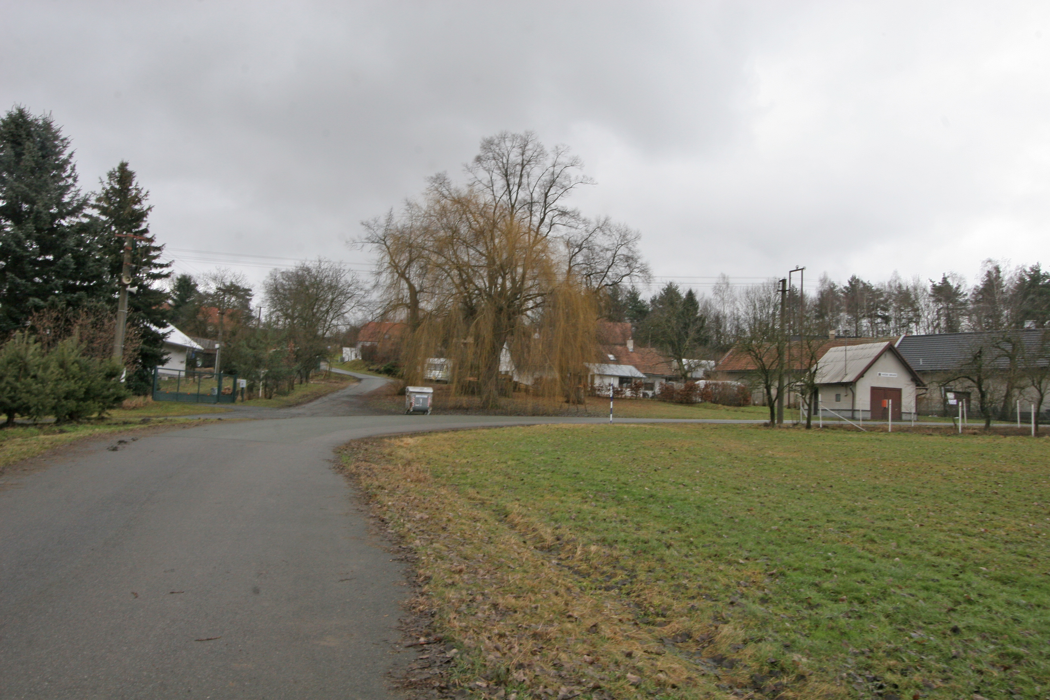 Česky: Kasaličky